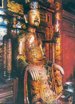 Tuong Vua Dinh Tien Hoang tai den Dinh - Le (Hoa Lu - Ninh Binh)